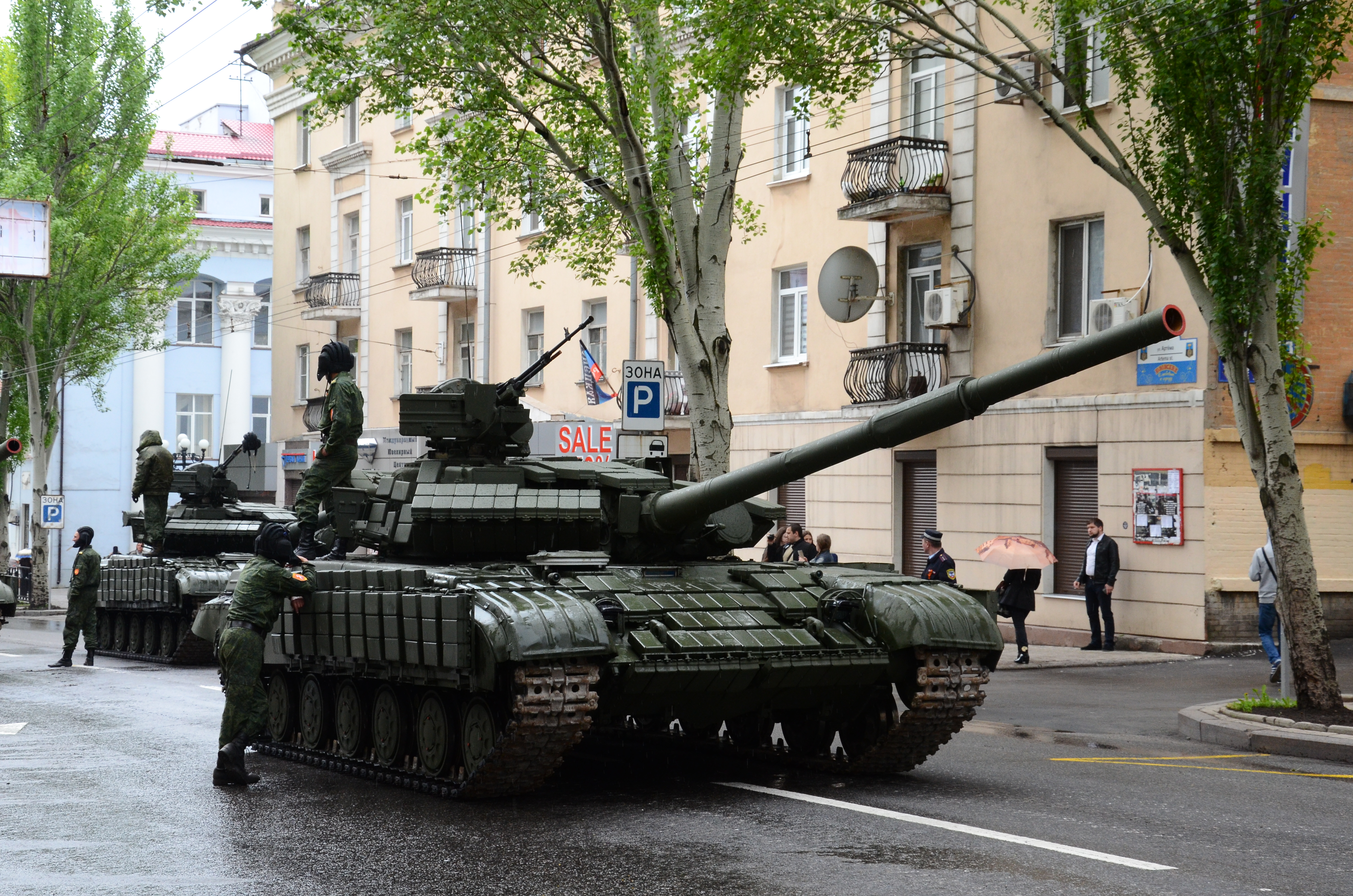 День Победы в Донецке